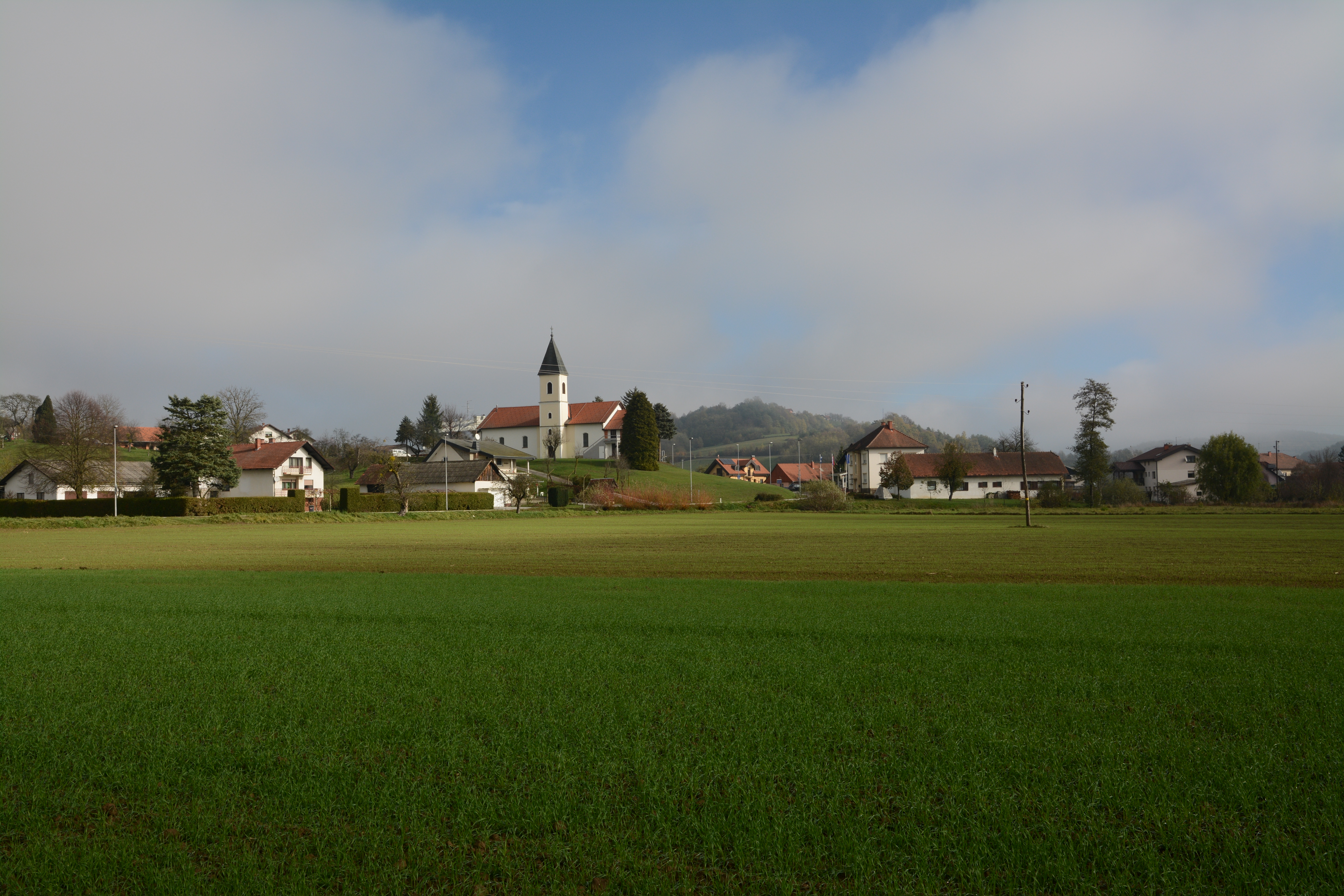 Kuzma Zentrum